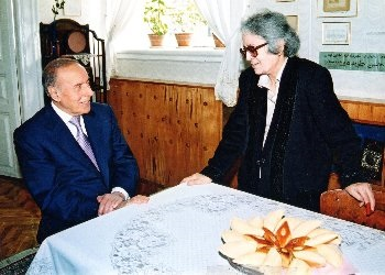 Muzeyin açılışı